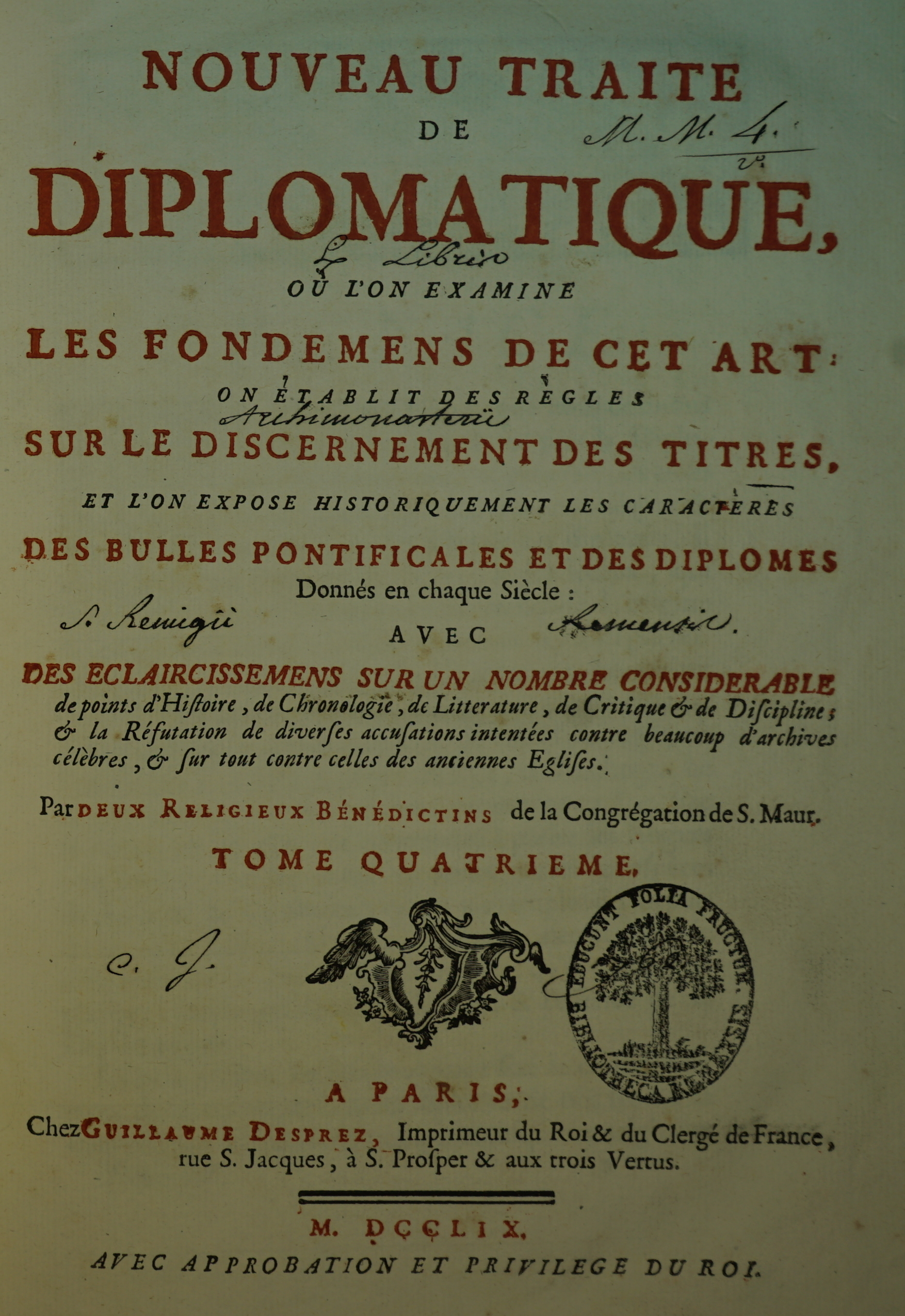 extrait du "nouveau traité de diplomatique" tome 4.